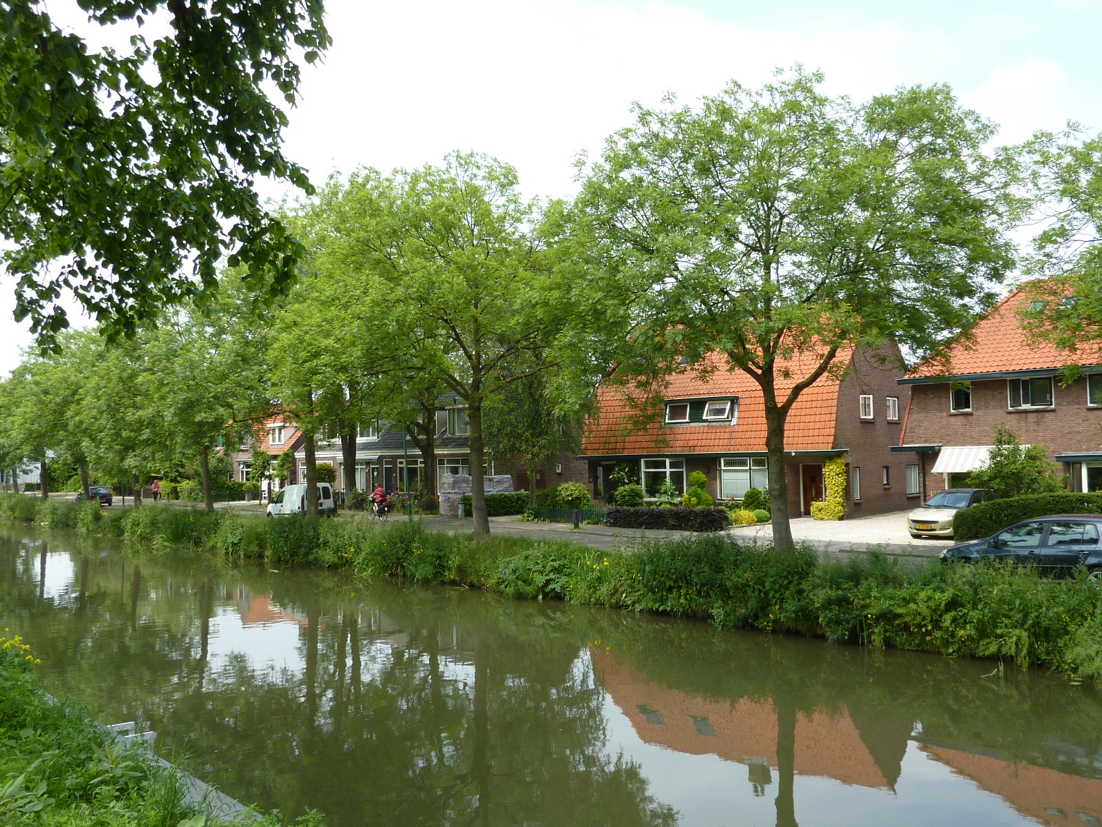 Huizen aan de zandweg te De Meern